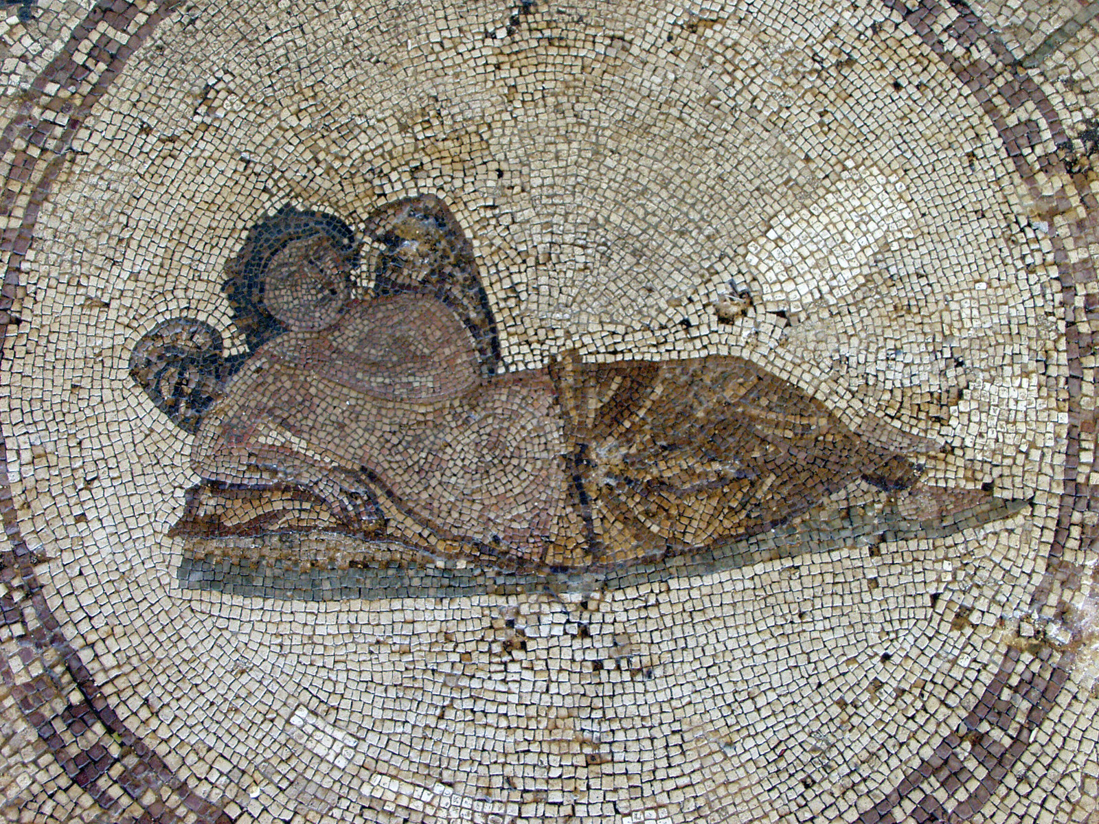 Mozaika przestawiajaca boga Hypnosa pochodząca z willi rzyskiej znajdującej sie w Risan (Czarnogóra)